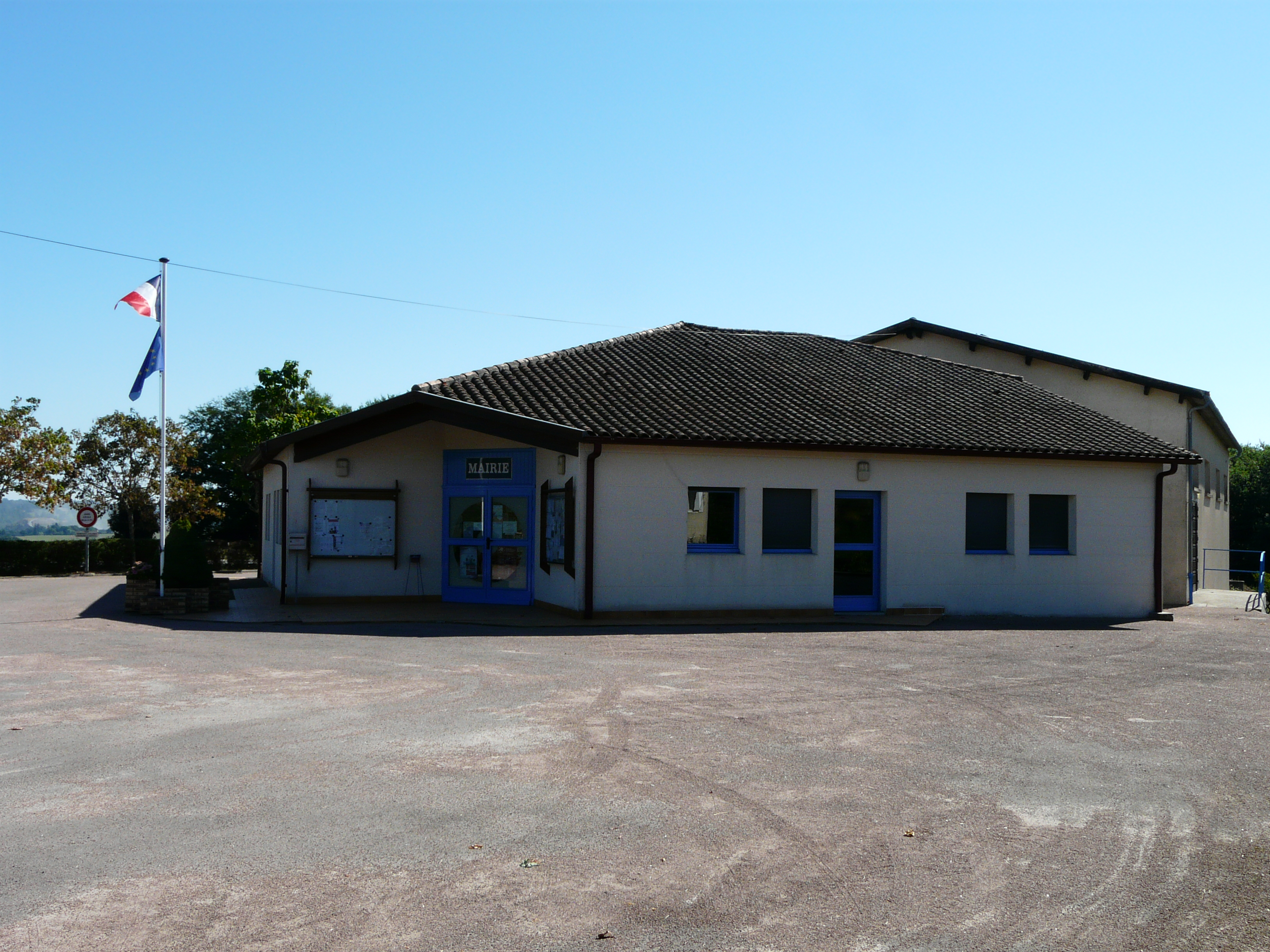 La mairie de Saint-Romain-et-Saint-Clément, Dordogne, France.